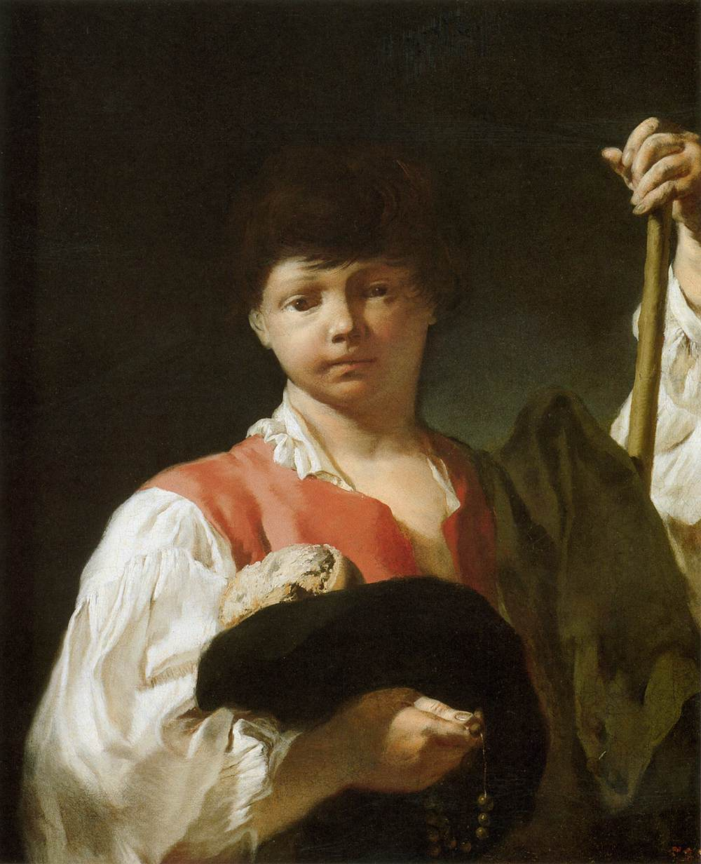 Beggar boy